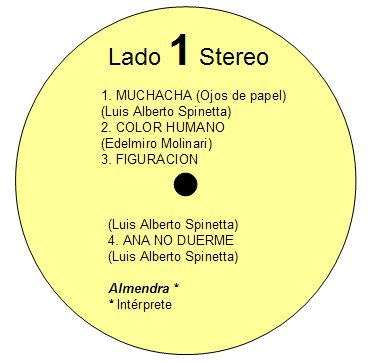 Dibujo propio de la tapa del LP Almendra I (Lado A)